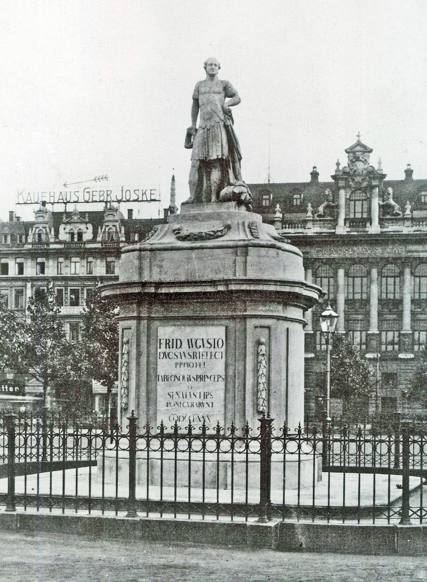 Das König-Friedrich-August-Denkmal von Adam Friedrich Oeser (Statue) und Johann Carl Friedrich Dauthe (Denkmalsockel) auf dem Königsplatz (um 1910). Die Figur steht ohne den monumentalen Sockel seit 1936 im Park des Gohliser Schlösschens.